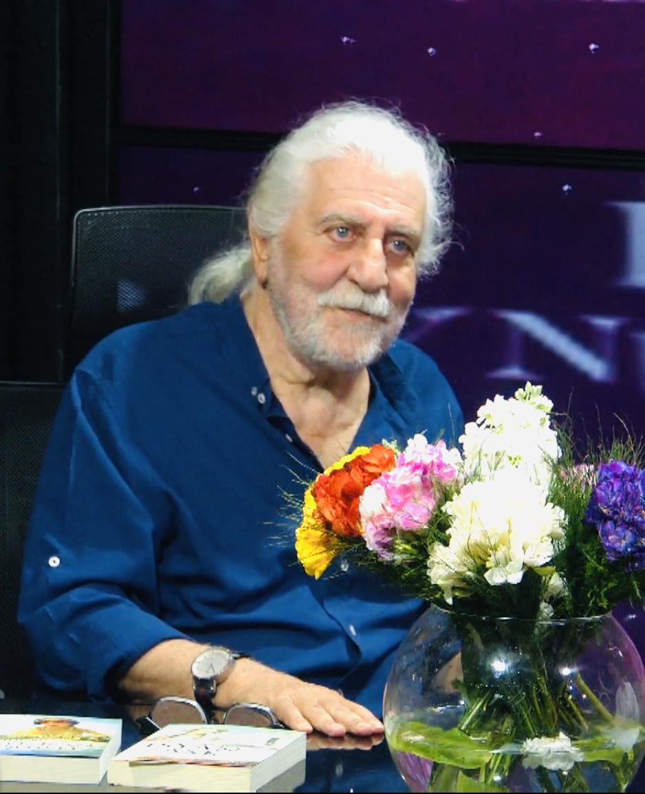 Halil Bezmen 2019